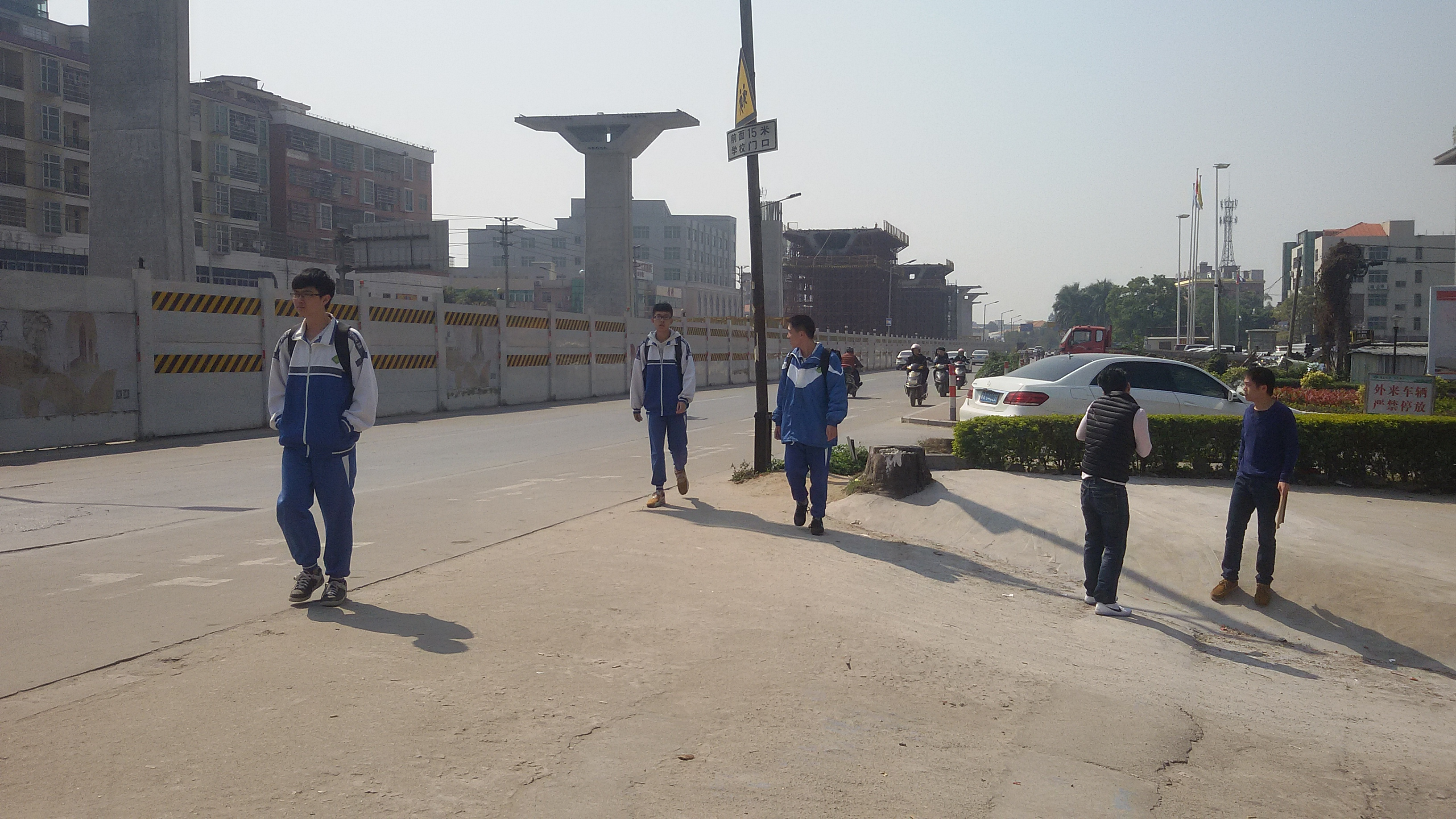 粵語: 广州市第80中学嘅校服（长衫+长裤、风褛）